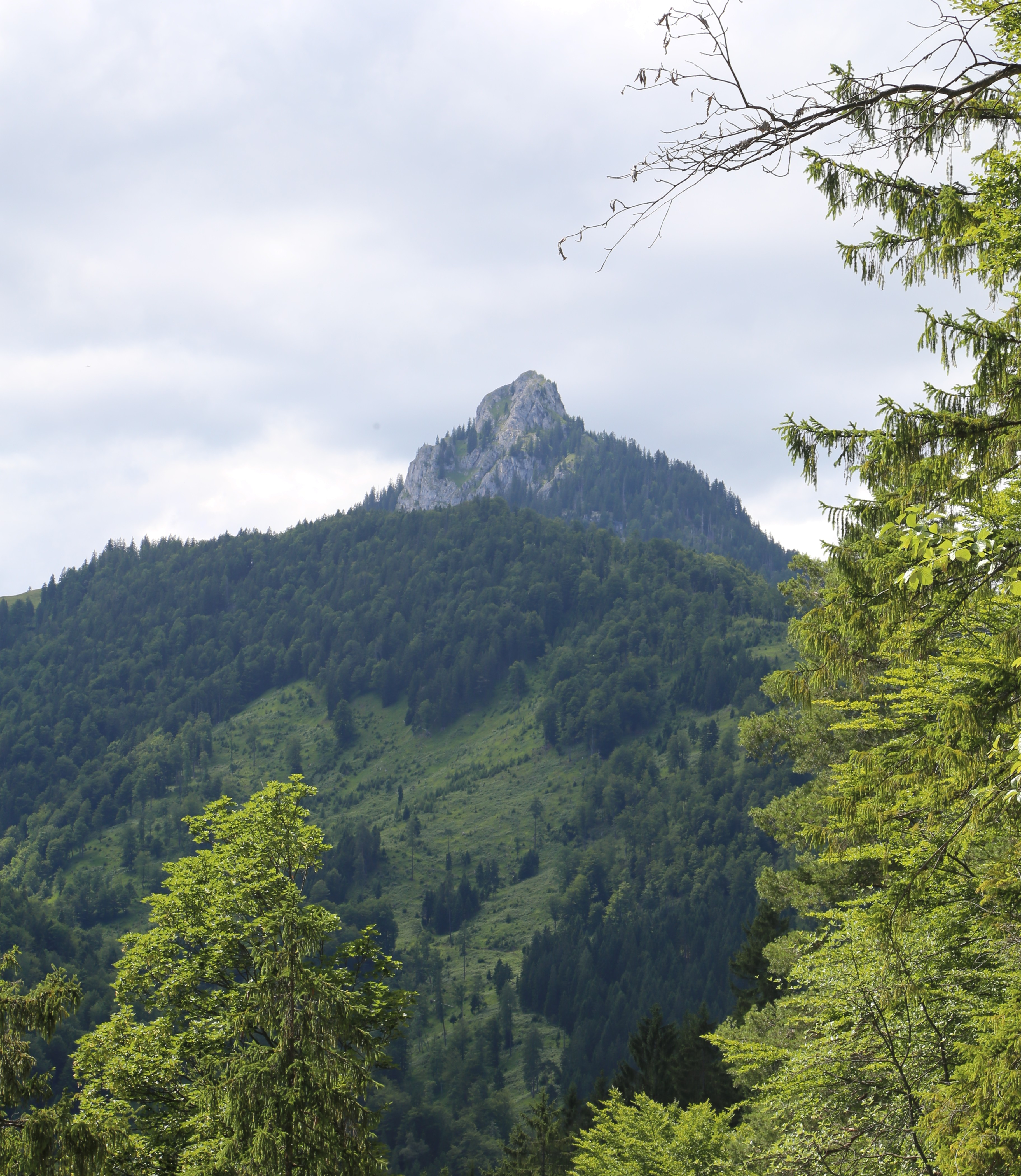 Brünnstein vom Schwarzenberg gesehen, Kiefersfelden